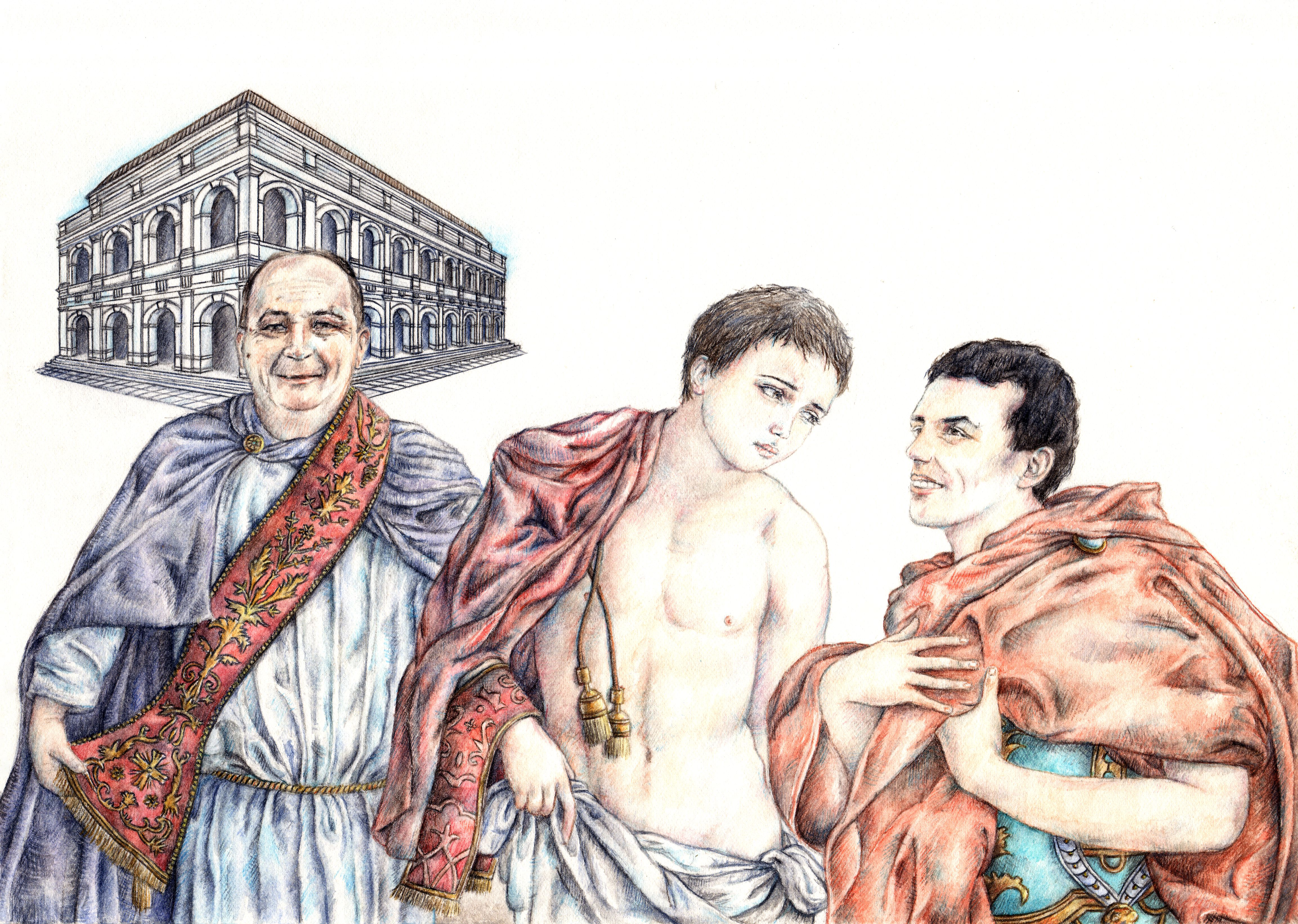 Cesario diacono è condotto al Foro Emiliano per essere giudicato; improvvisamente il console Leonzio si converte al Cristianesimo e chiede di essere battezzato. Sullo Sfondo vi è una ricostruzione della Basilica Forense di Terracina.